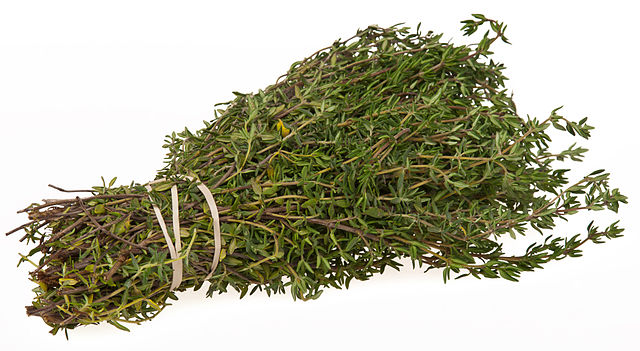 Utlizado comunmente en la cosina mediterranea.